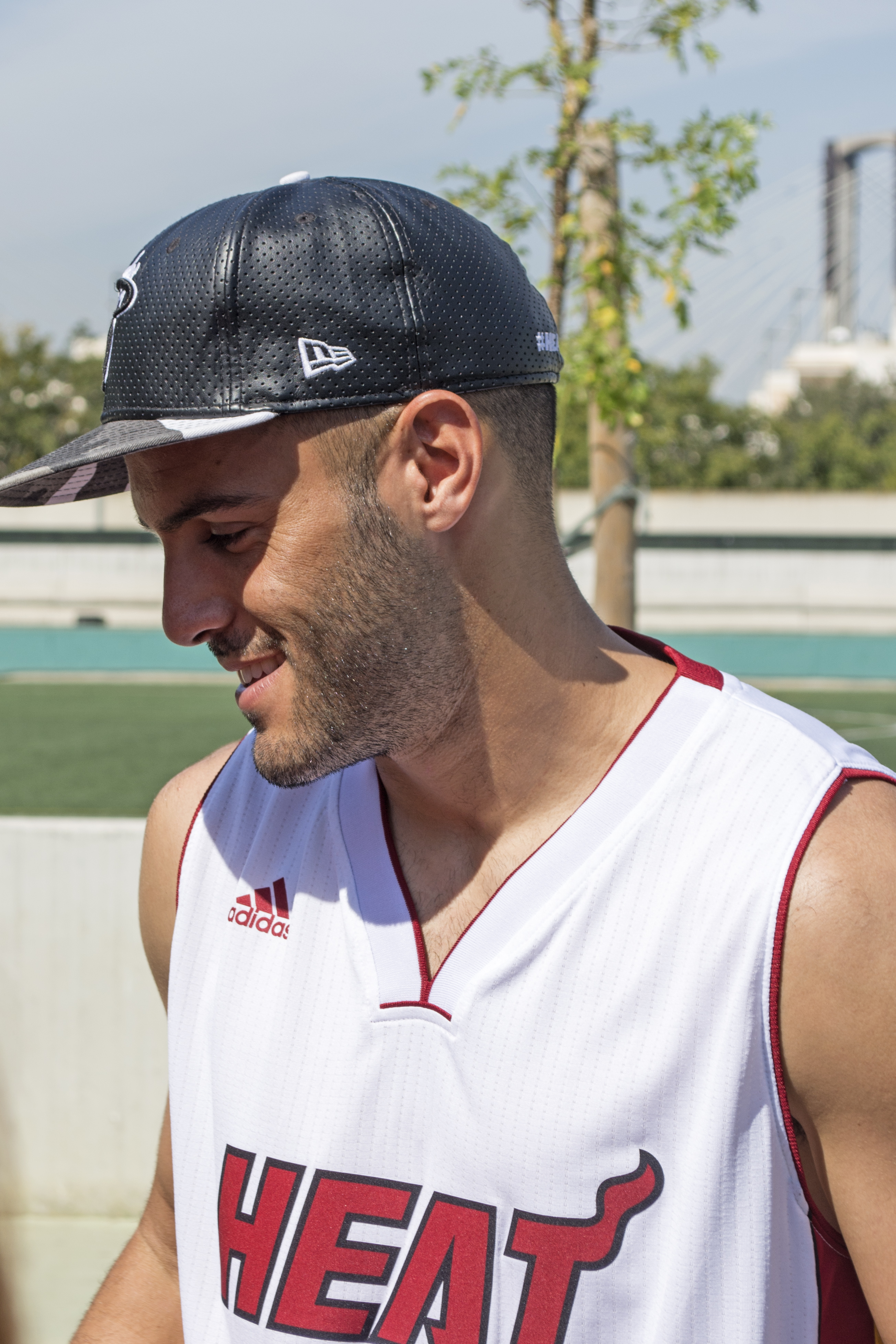 Bruno González futbolista del Real Betis en 2015. Ciudad deportiva Luis del Sol